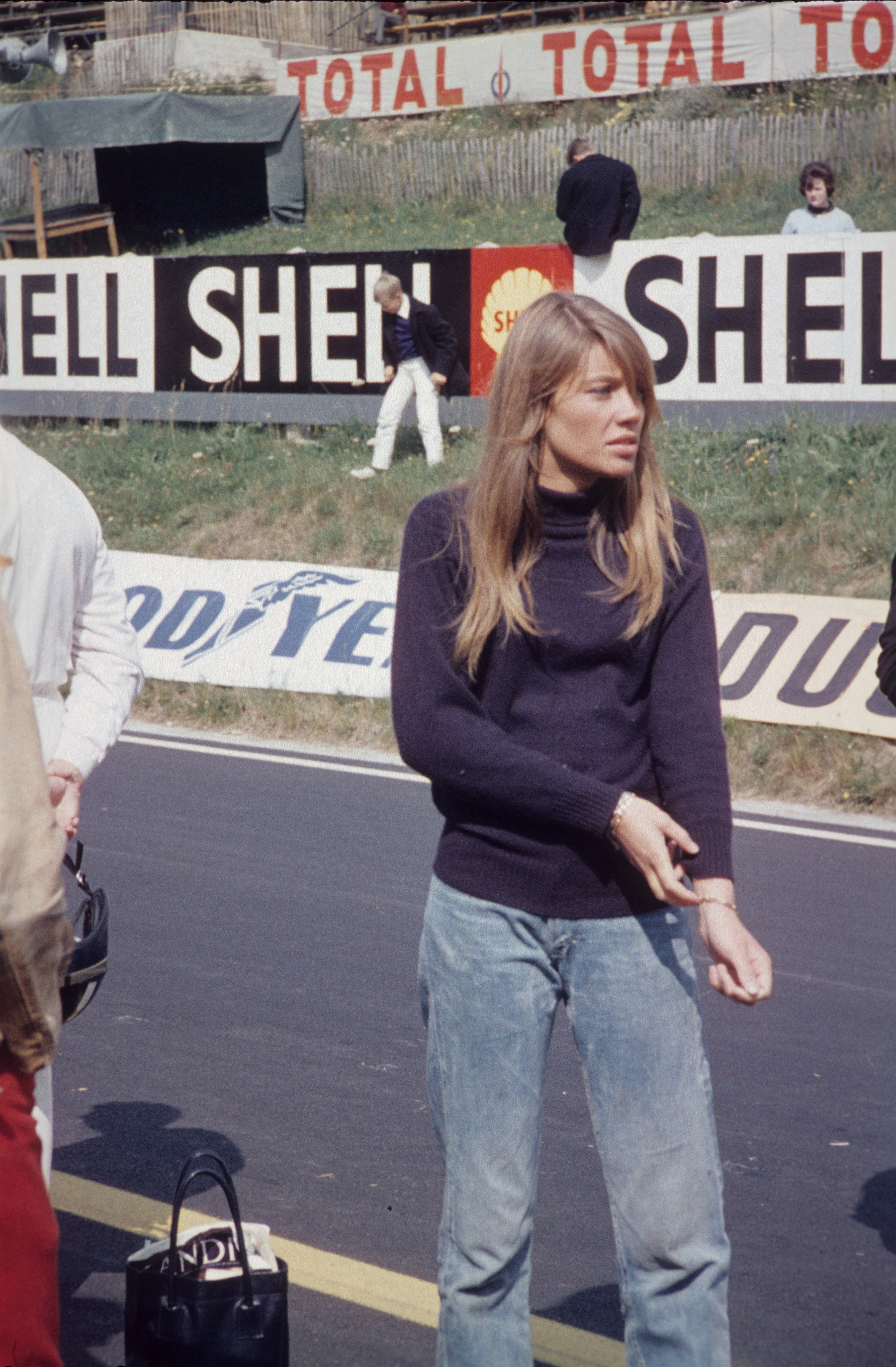 La chanteuse (et ici actrice) française Françoise Hardy lors du tournage du film Grand Prix, sur le circuit de Charade, en août 1966.